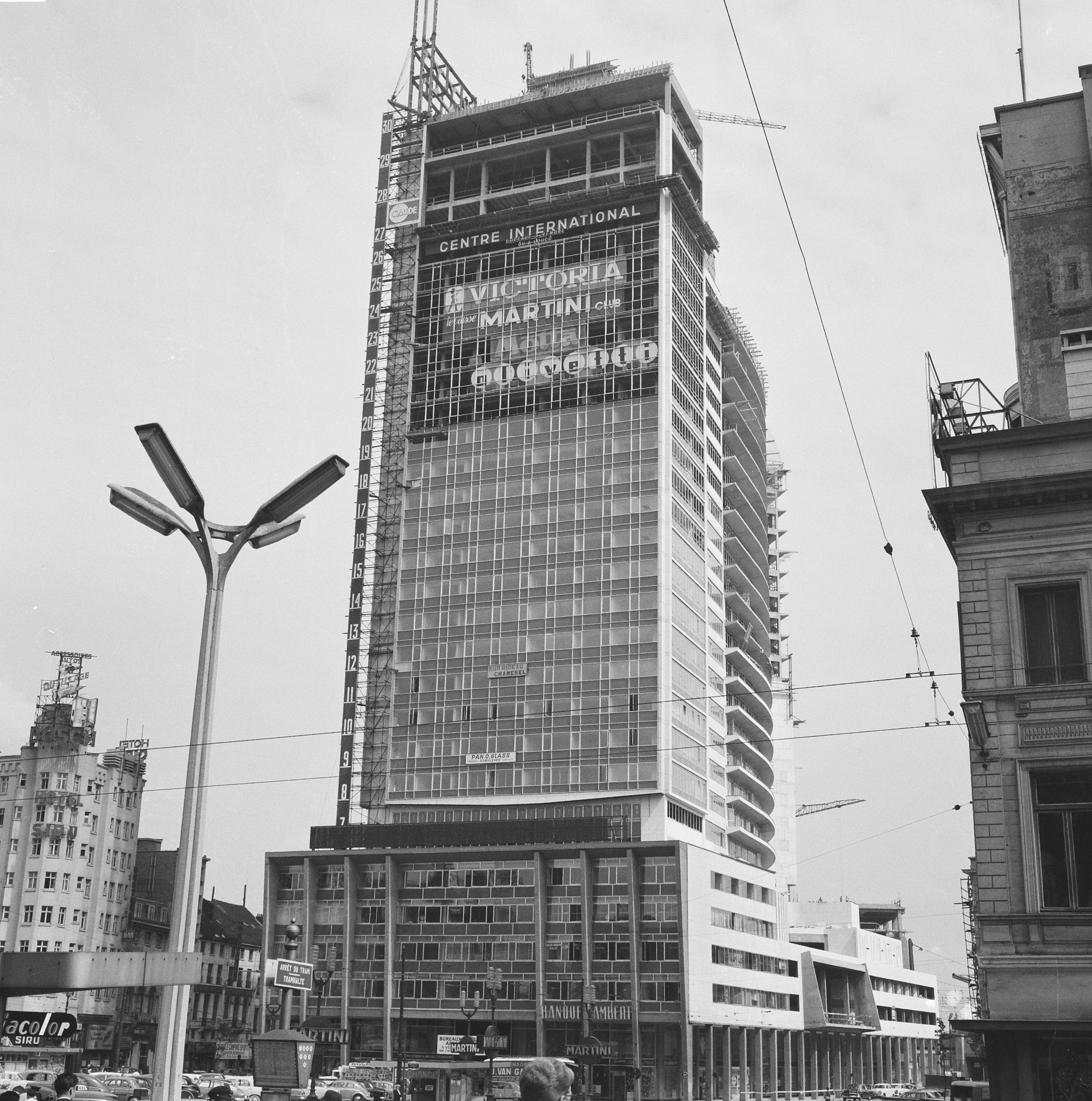 Collectie / Archief : Fotocollectie Anefo Reportage / Serie : [ onbekend ] Beschrijving : Wolkenkrabber te Brussel Datum : 18 maart 1963 Locatie : Brussel Trefwoorden : wolkenkrabbers Fotograaf : Pot, Harry / Anefo Auteursrechthebbende : Nationaal Archief Materiaalsoort : Negatief (zwart/wit) Nummer archiefinventaris : bekijk toegang 2.24.01.03 Bestanddeelnummer : 914-9434